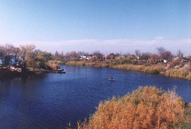 El Vovtxa prop de Pavlohrad, a l'óblast veí de Dnipropetrovsk. El Vovtxa prop de Pavlohrad.